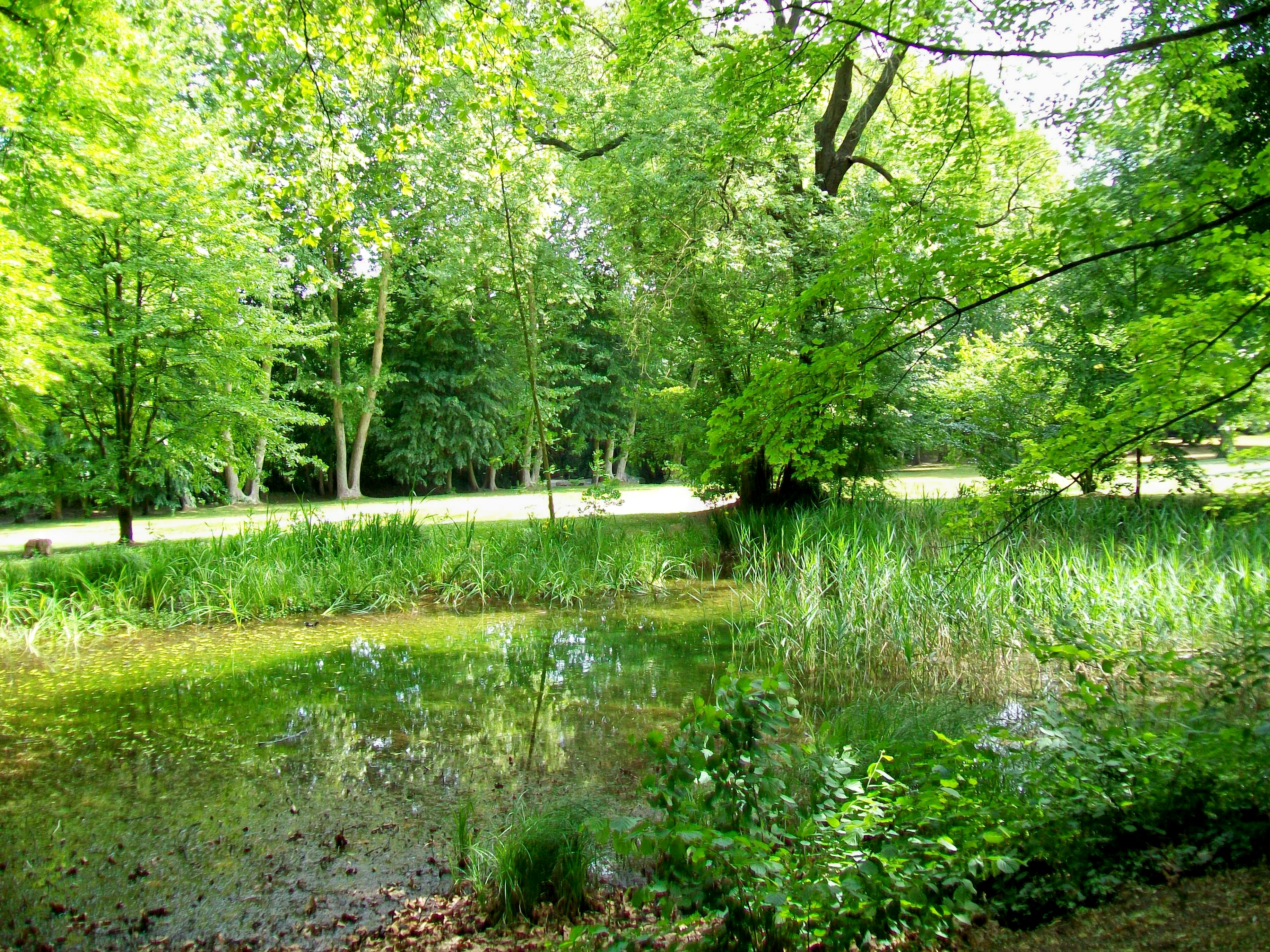 L'une des deux pièces d'eau du parc de Touteville, jardin à l'anglaise ayant jadis appartenu au château de Touteville. Tandis que cet étang laisse toute sa place à la nature, l'autre est de conception classique.